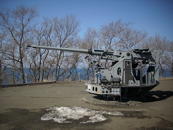 владивостокская крепость